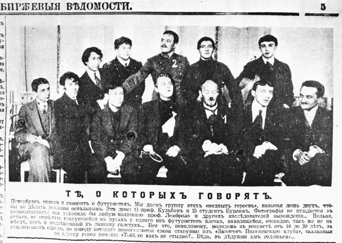 Футуристы